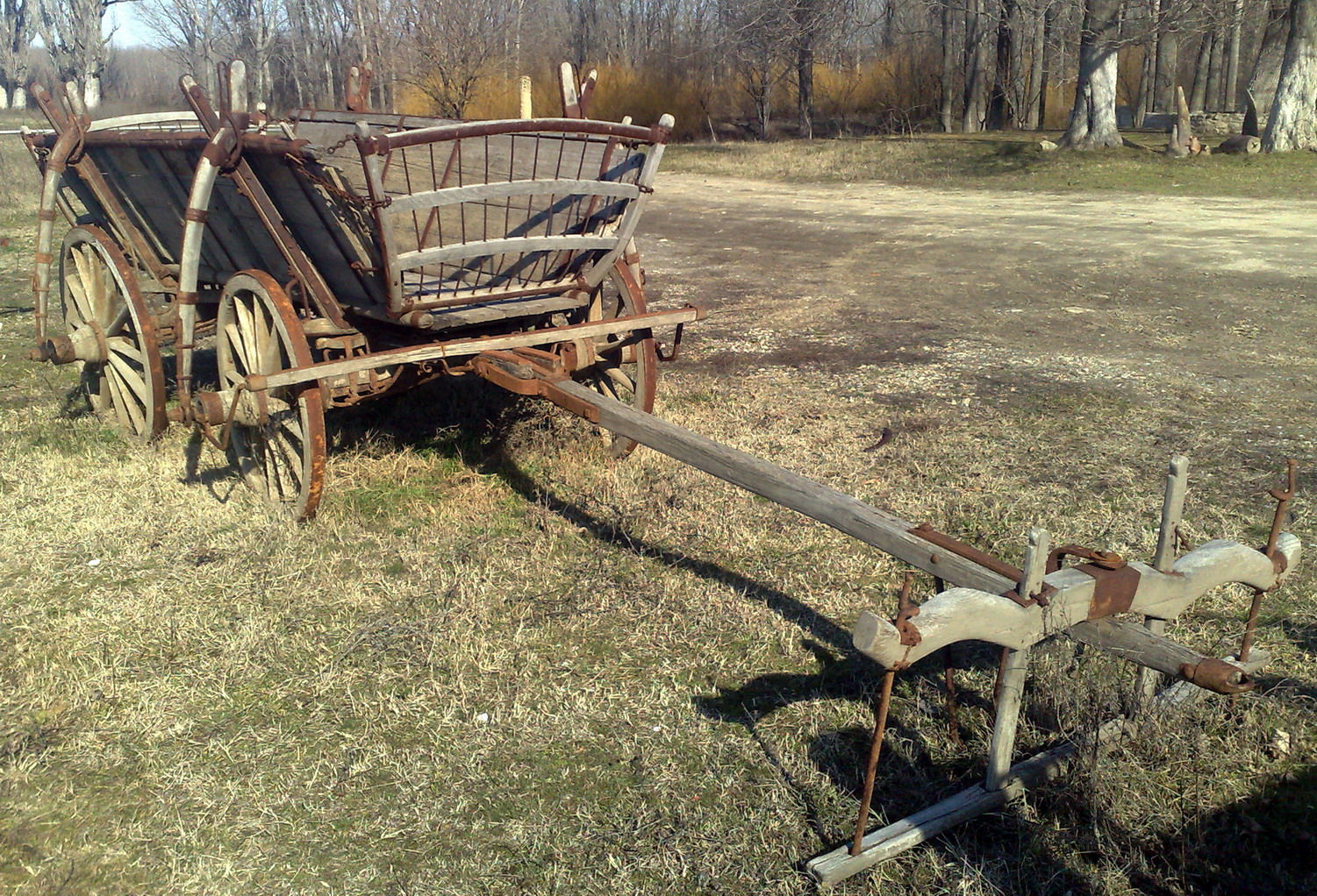 car specific Romaniei